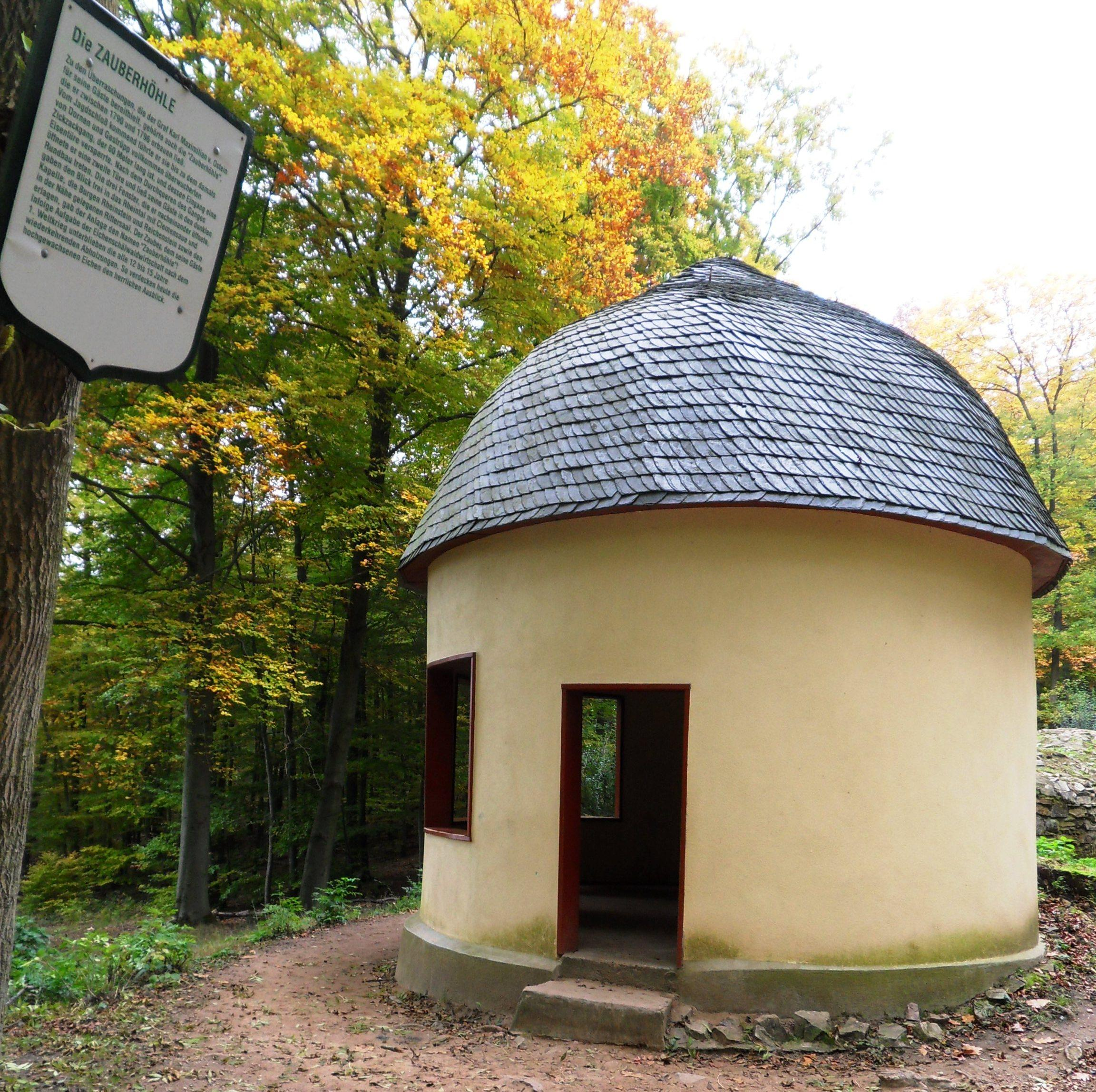 Informationstafel am Ausgang der Zauberhöhle im Landschaftspark Niederwald bei Rüdesheim. Graf Karl Maximilian von Ostein ließ zwischen 1790 und 1796 einen 60 Meter langen gewundenen Tunnelgang erbauen, der durch ein Dornengestrüpp führte und in einem Rundbau endete, dessen drei Fenster den Blick zur Clemenskapelle im Rheintal, zur Burg Rheinstein und zum Rittersaal freigaben.